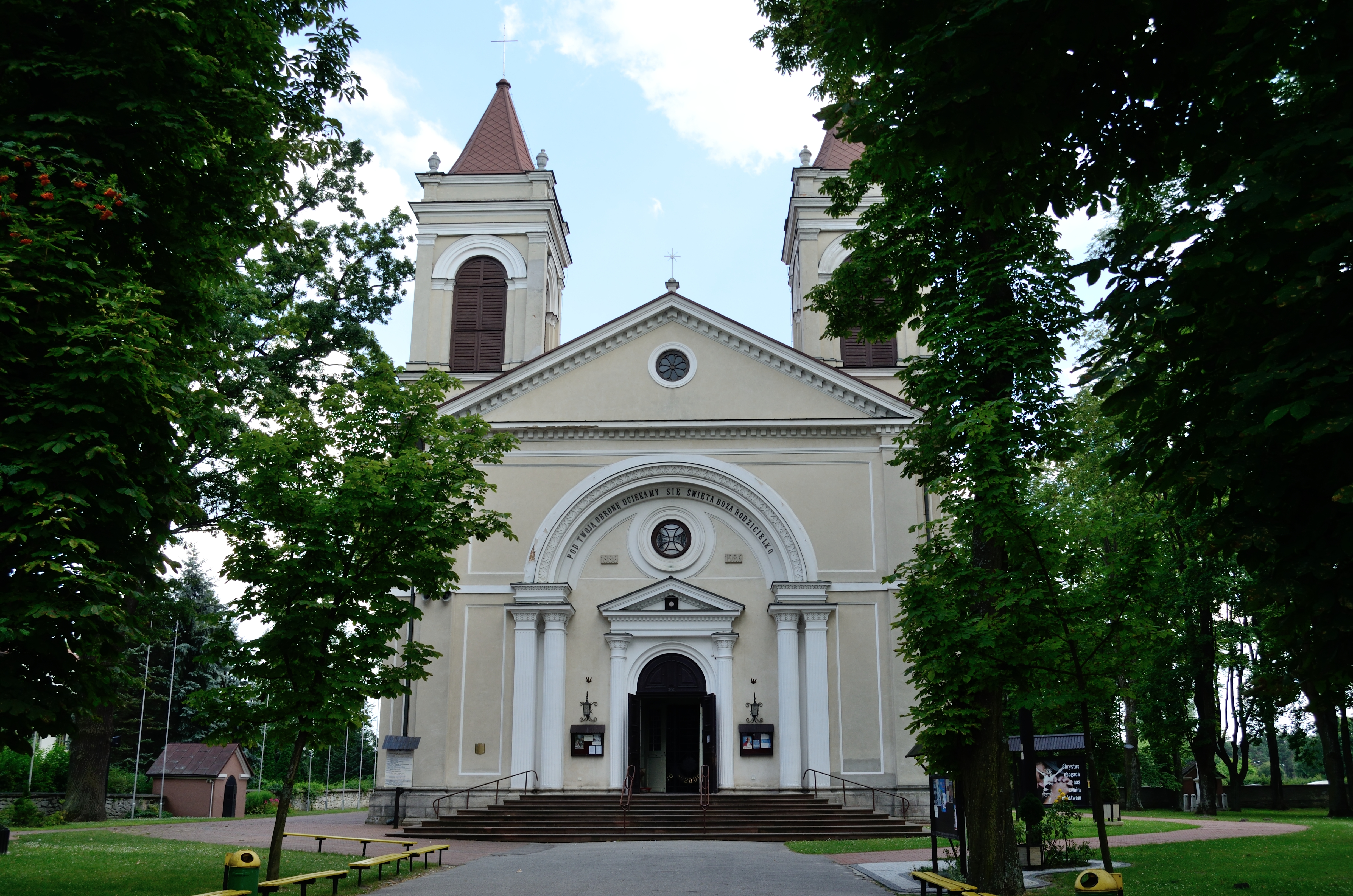 Kościół Niepokalanego Poczęcia NMP